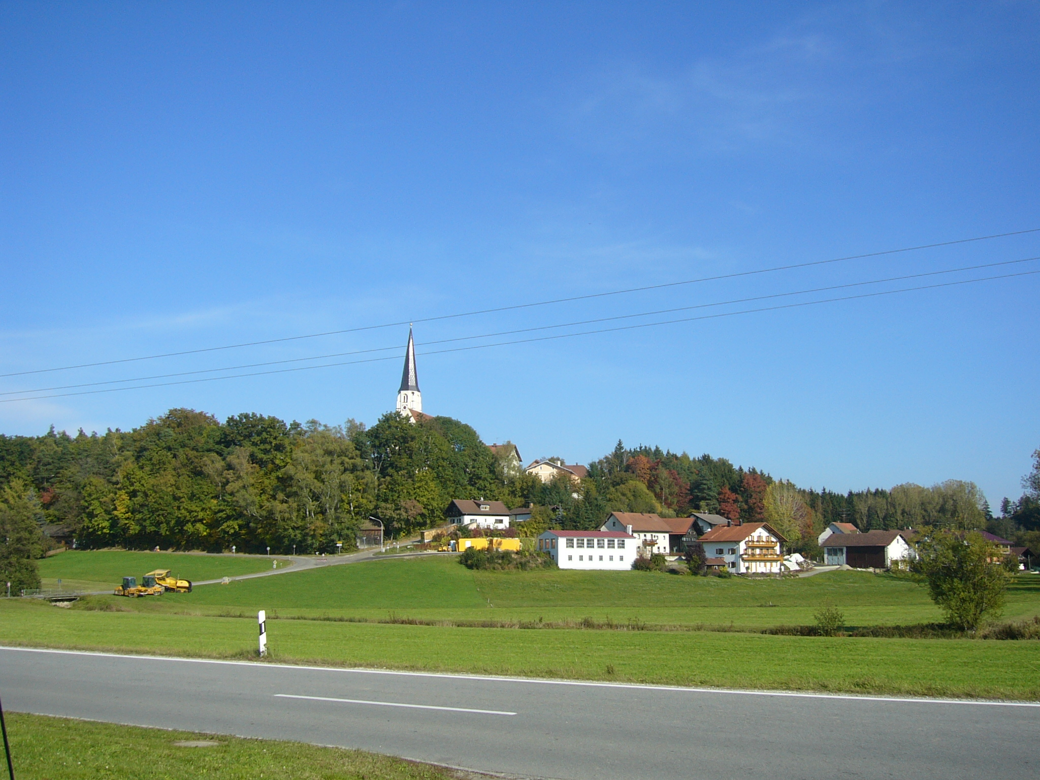 Dietersburg, Landkreis Rottal-Inn, von der Bundesstraße 388 gesehen.